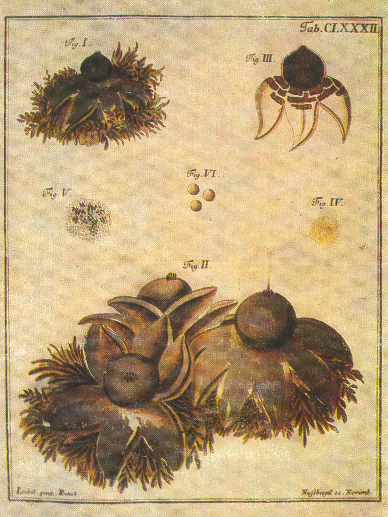 Farbtafel aus Fungorum qui in Bavaria et Palatinatu circa Ratisbonam nascentur icones nativa coloribus expressa, Ratisbonate, Regensburg, Band 2 (1763), Abbildung von Geastrum rufescens